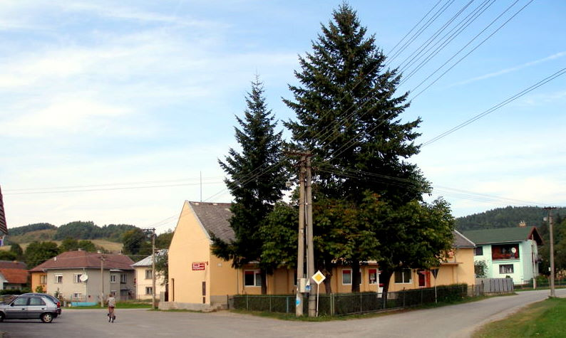 Pôvodná budova prvého nákupného strediska s predajňou potravín a rozličného tovaru ktorej výstavba sa začala v roku 1956. Obec Sedlice. Okres Prešov. Ulica Valal.